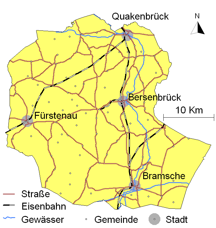 Gemeinden im ehemaligen Landkreis Bersenbrück